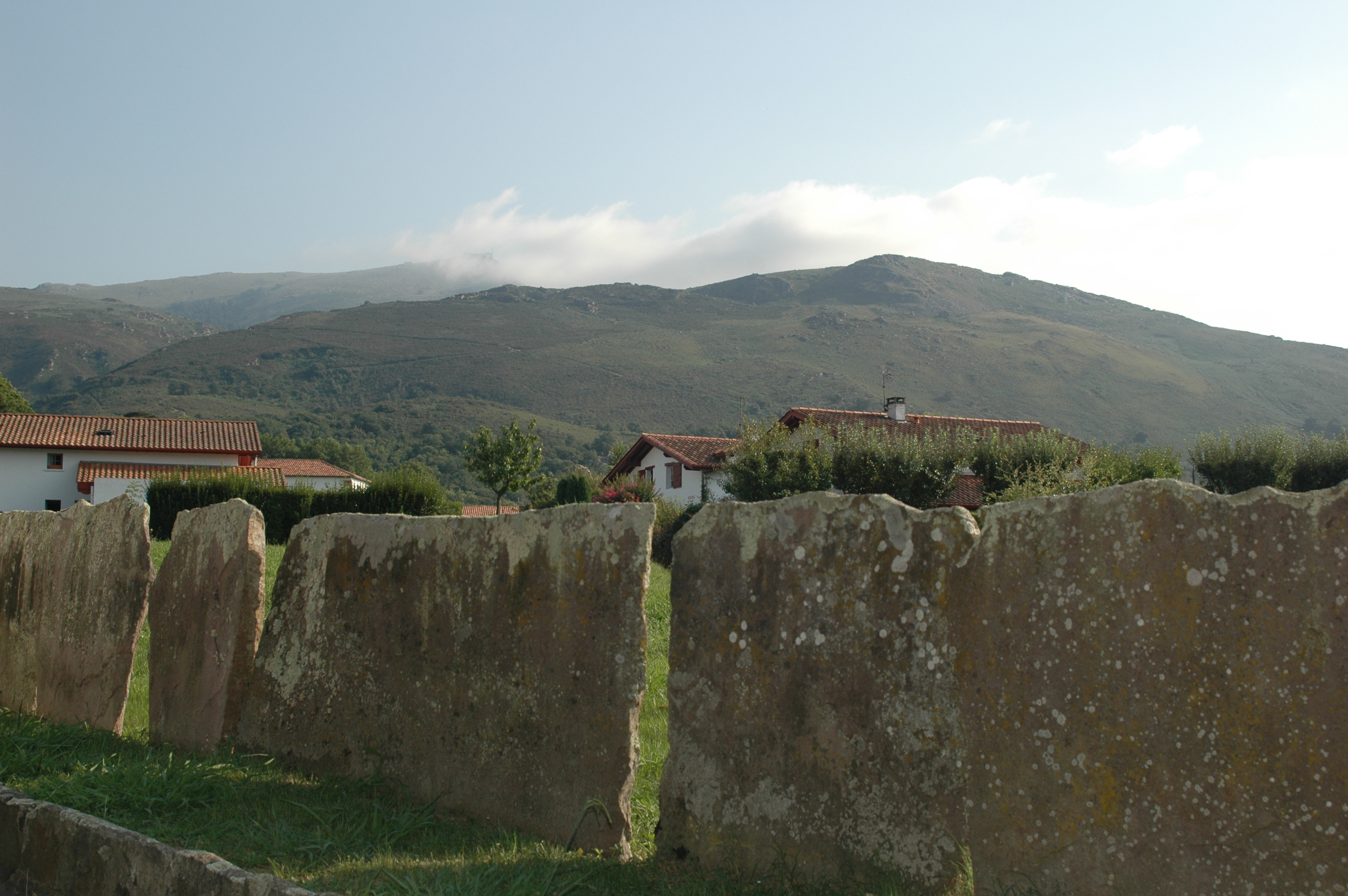 Ascain, clôture en grès rose de la Rhune. Photo prise le 23/07/06 par Harrieta171